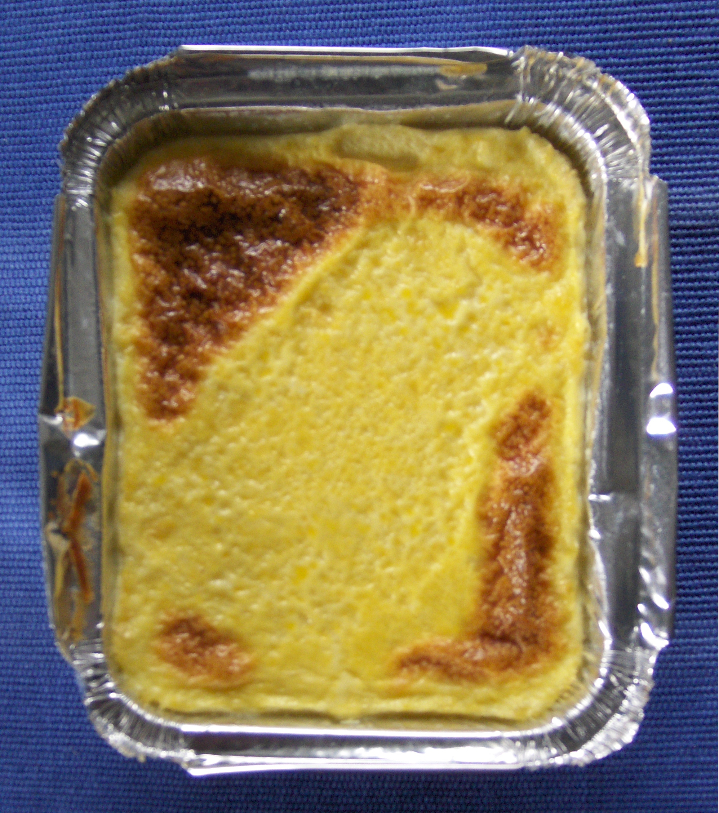 Kalvdans lagad i Vråna, Nås.